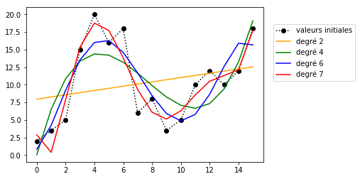 Influence du nombre de paramètres (degrés du polynome)